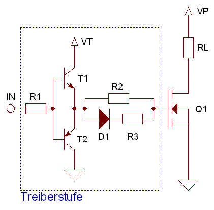 Gate-Treiber mit Gegentaktstufe